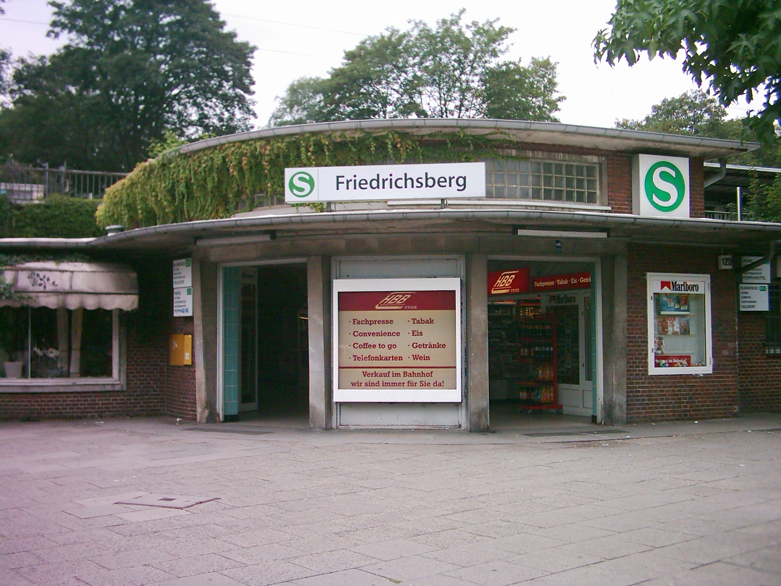 Hamburg-Dulsberg: S-Bahn Haltestelle Friedrichsberg.